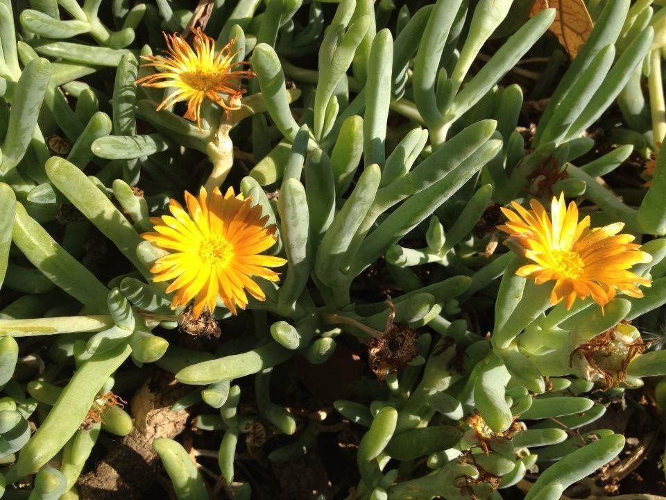 Malephora crocea de flor amarilla, Maspalomas, enero de 2013